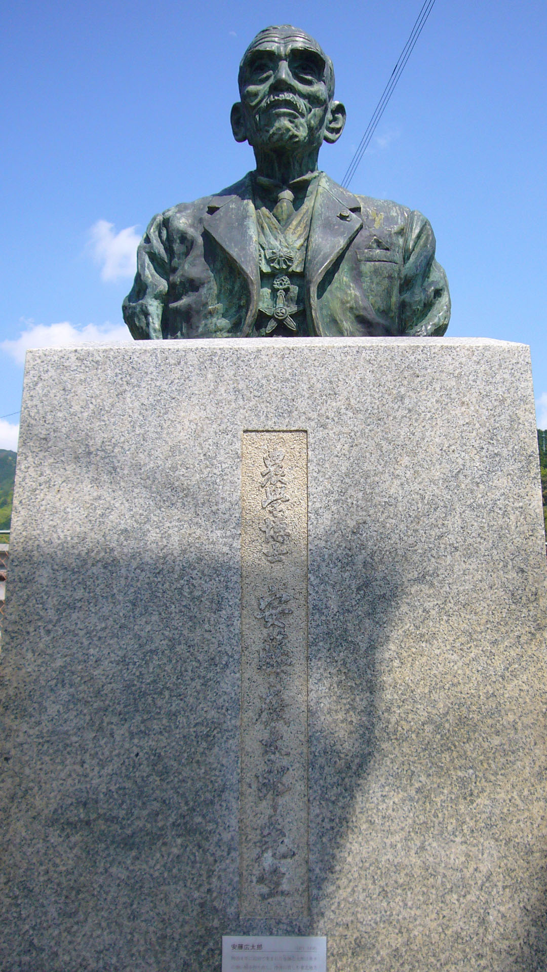 安藤広太郎像、撮影地-兵庫県丹波市），撮影者-663highland，撮影日-2006年5月4日